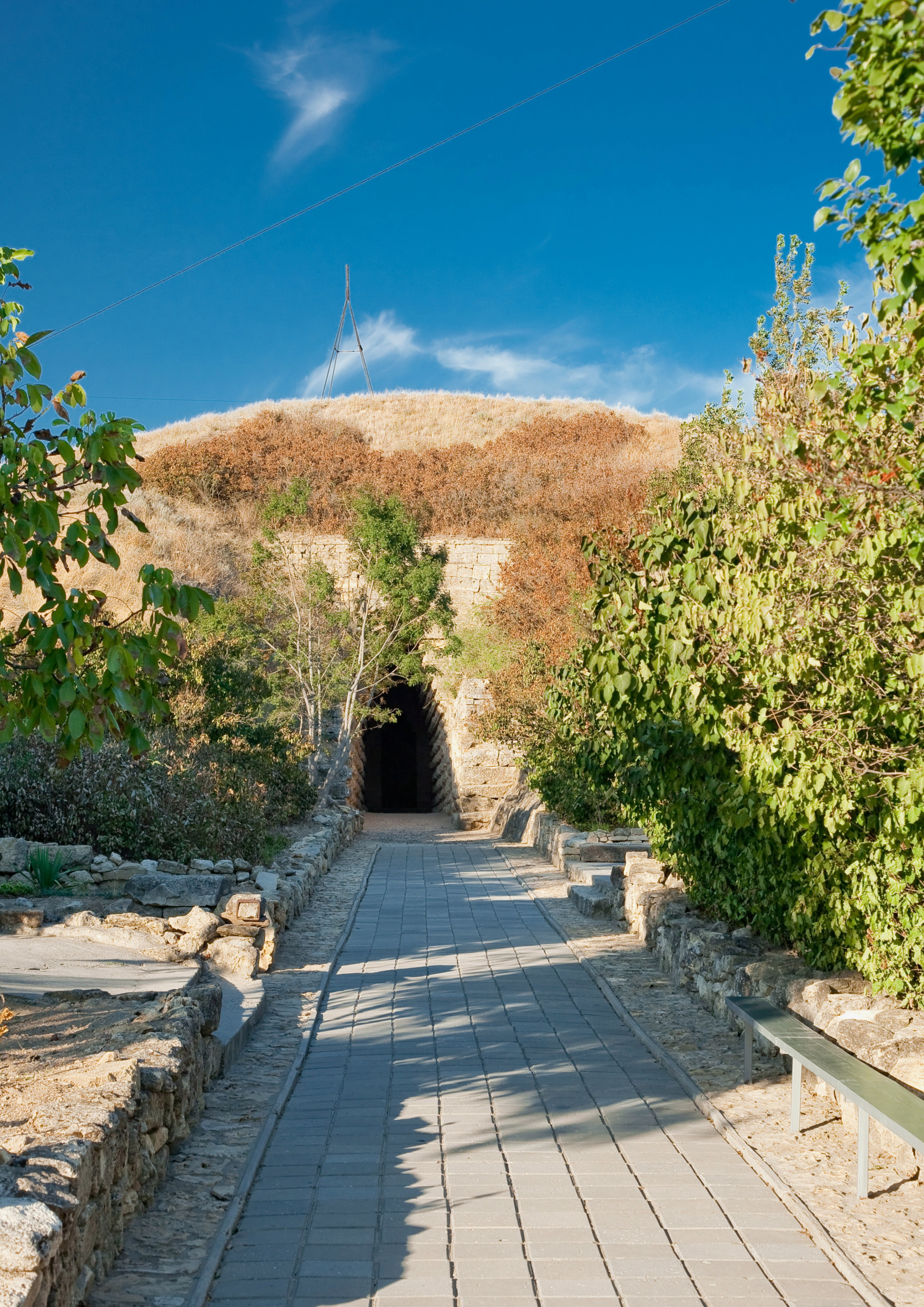 Керч, біля Аджимушкайських каменярень (400–500 м на схід)